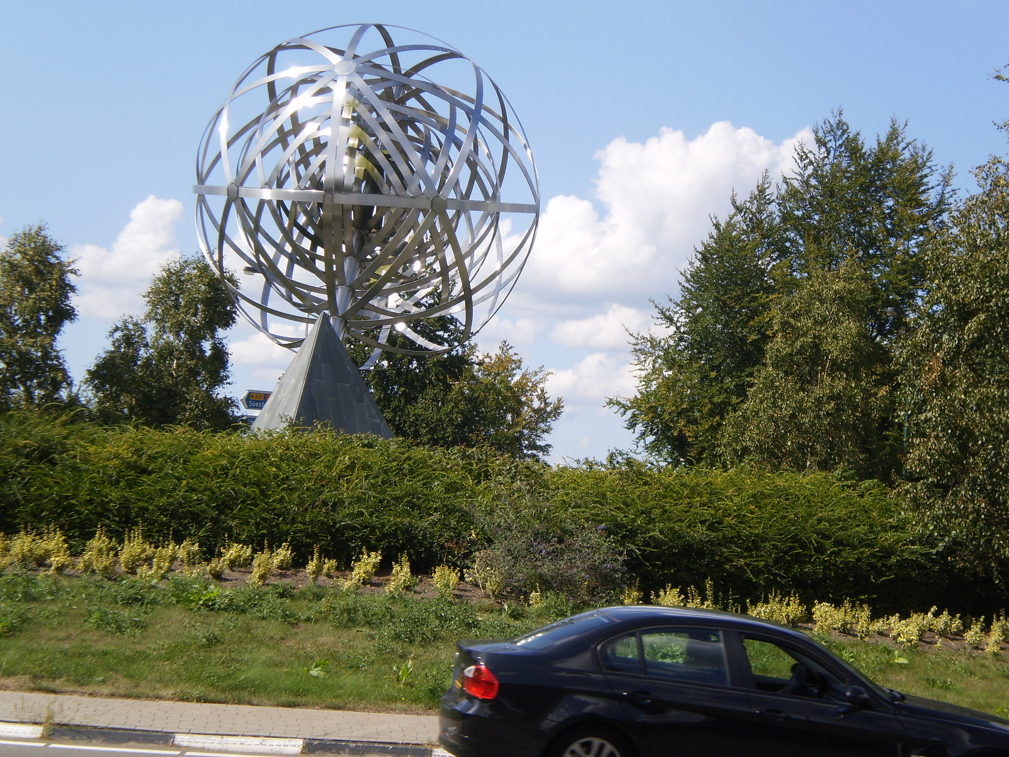 Oostkant Escher rotonde.